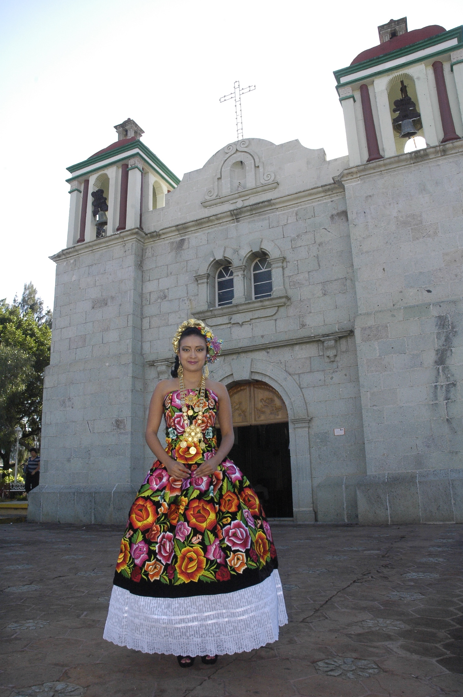 Traje utilizado para fiestas sociales.